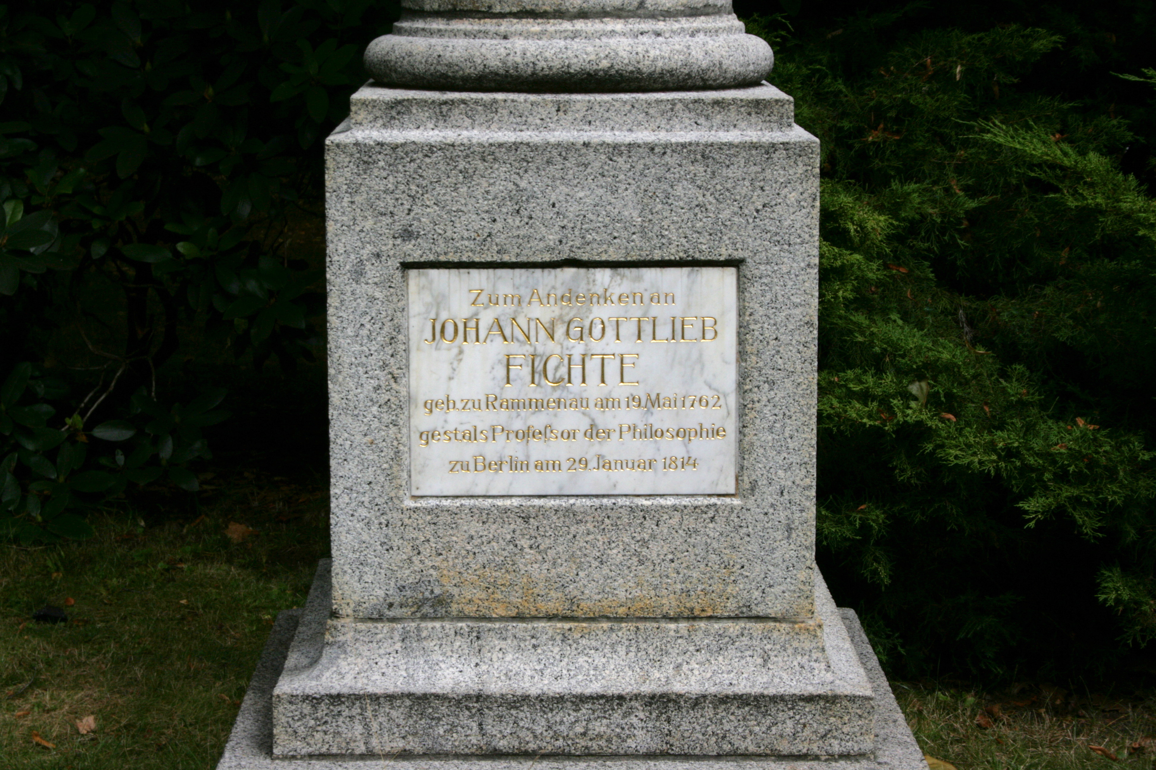 Johann-Gottlieb-Fichte-Denkmal im Johann-Gottlieb-Fichte-Park am Barockschloss Rammenau in Rammenau